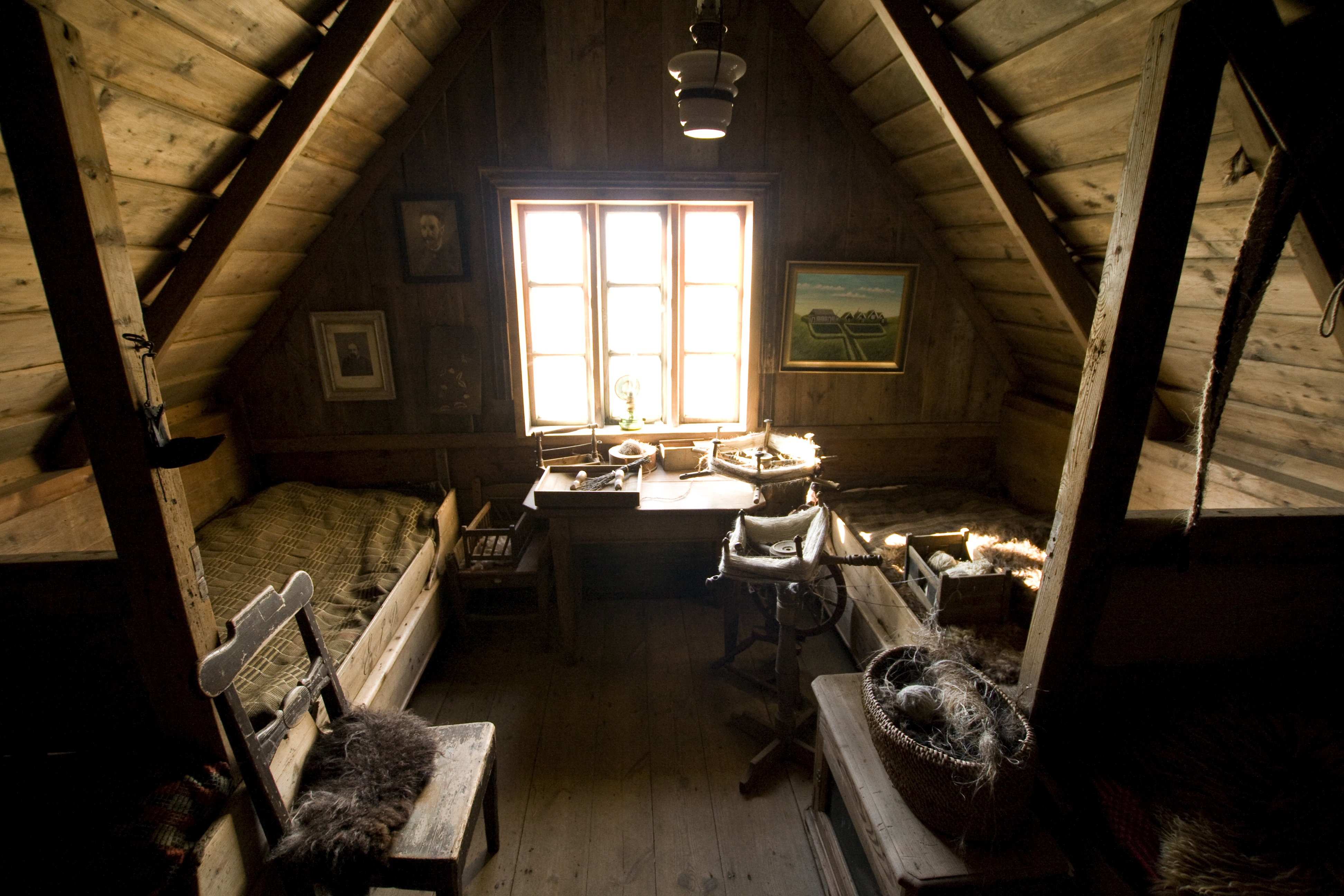 Attic bedroom, Skóga, Iceland